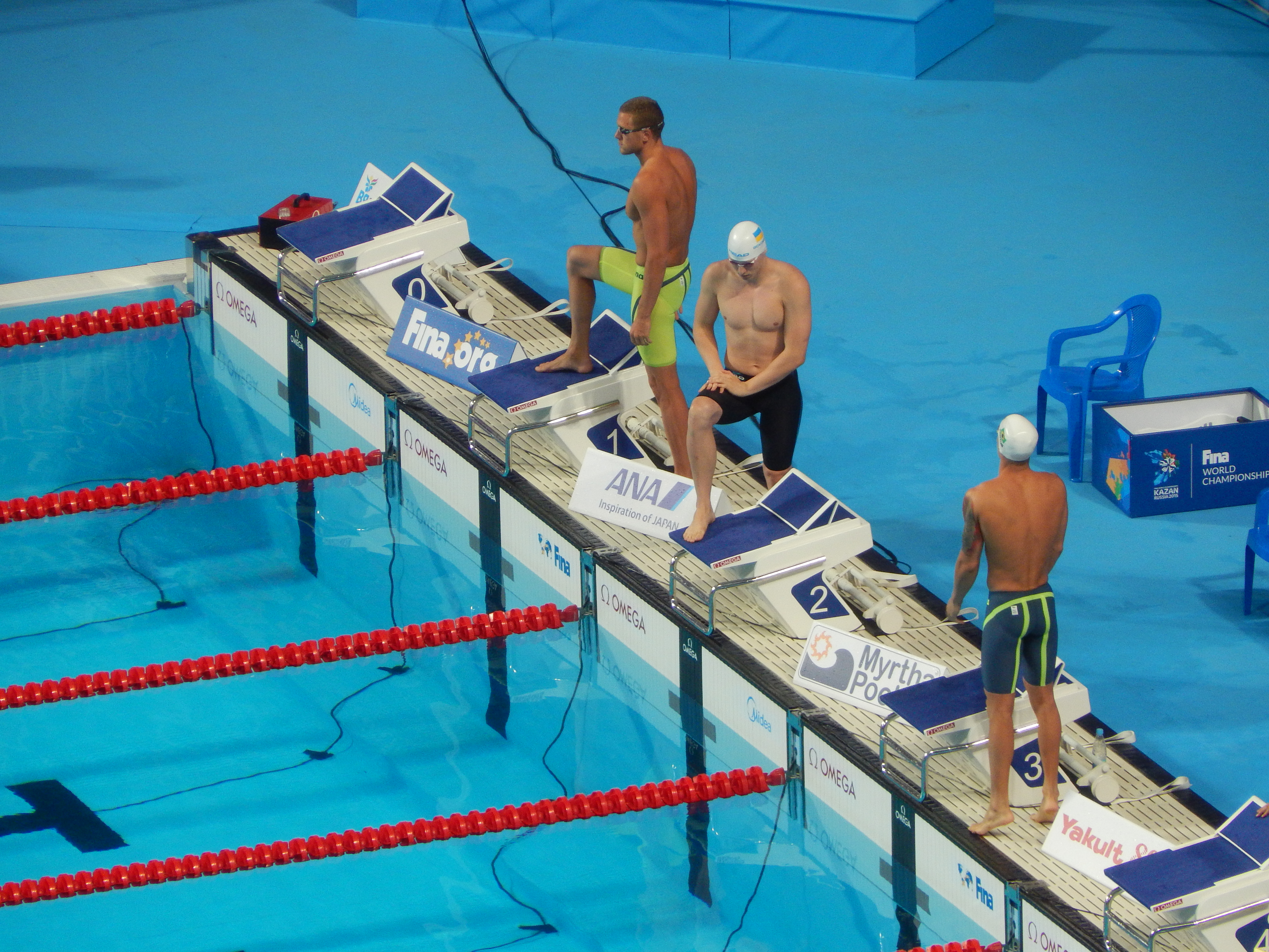 Гречин, Говоров и Фратус на чемпионате мира по плаванию в Казани